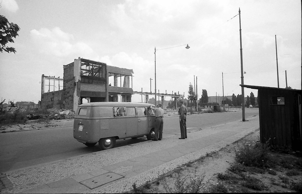 Westliche Zollkontrolle an der Bellevuestraße am Potsdamer Platz in Berlin, im Hintergrund die Reste des Columbushauses.